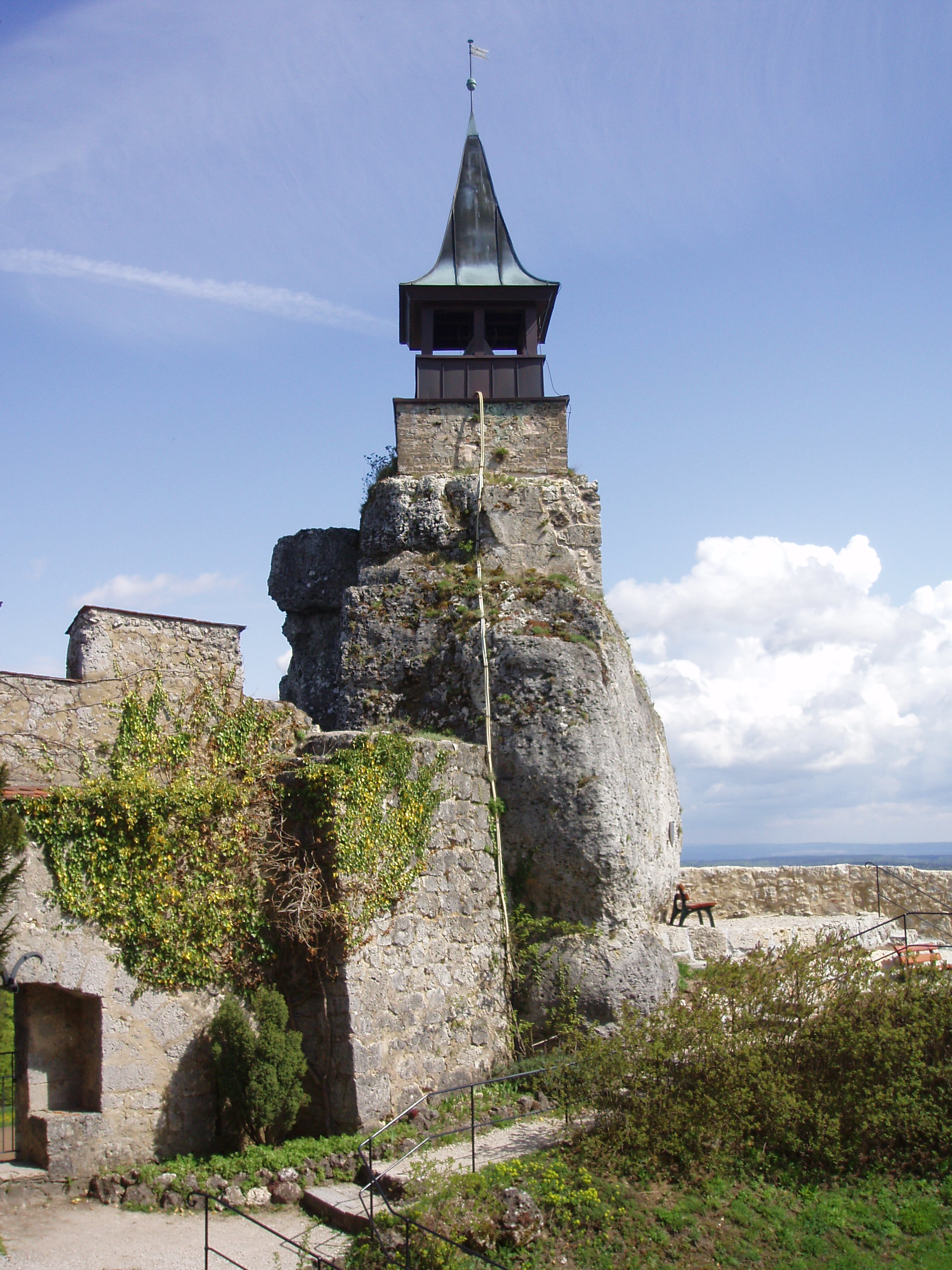 Rest des Bergfriedes von Burg Hohenstein